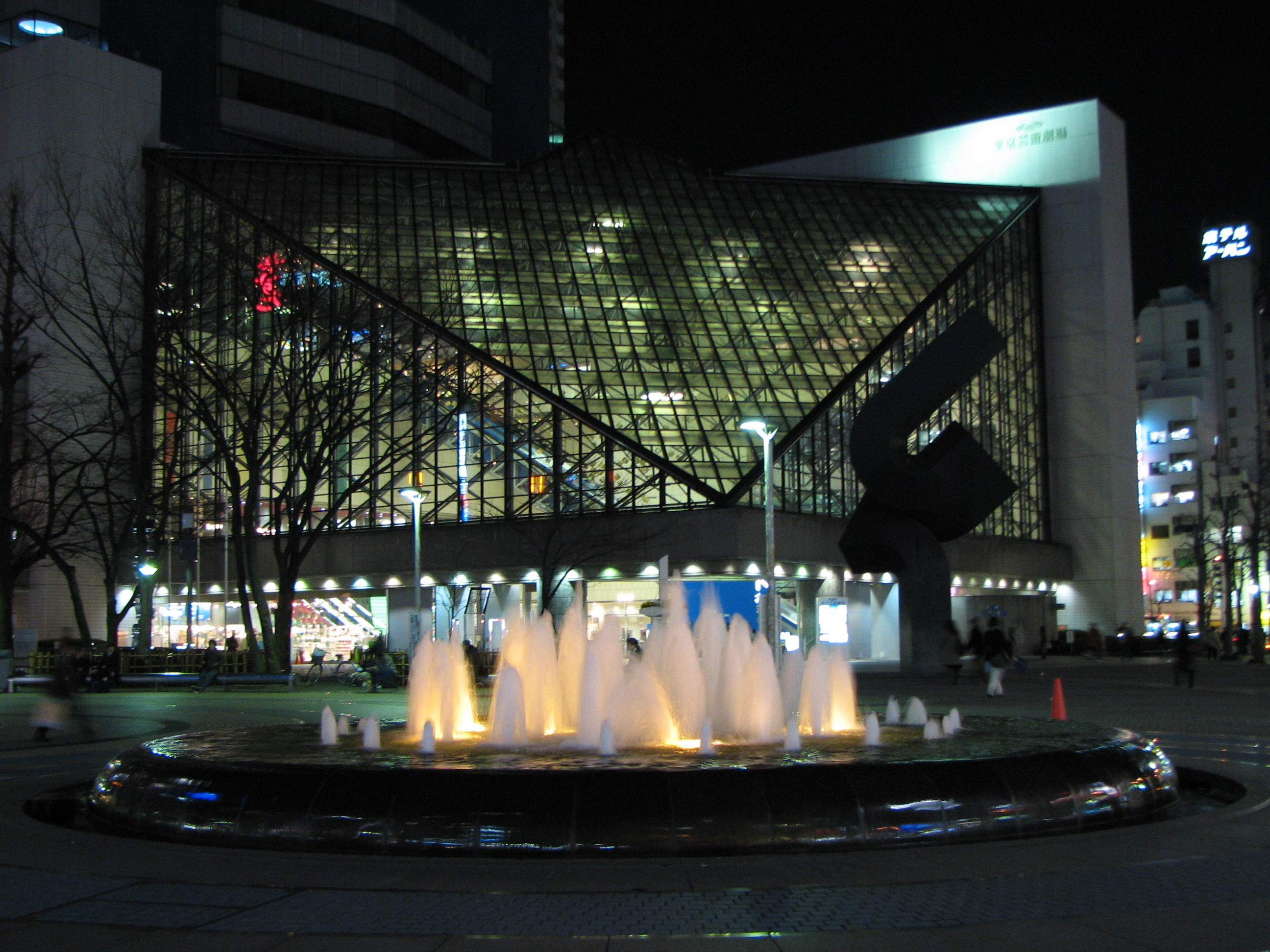 Ikebukuro West Exit Park 池袋西口公園 池袋西口公園